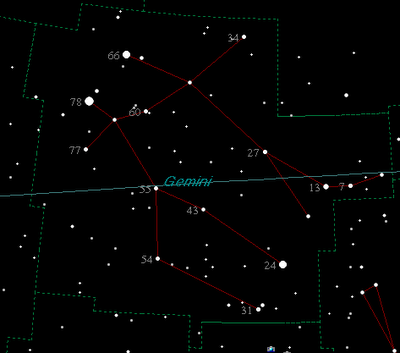 Cartes Du Ciel Sky Charts എന്ന സ്വതന്ത്ര സോഫ്റ്റ്‌വെയർ ഉപയോഗിച്ച് Shiju Alex നിർമ്മിച്ചത്.